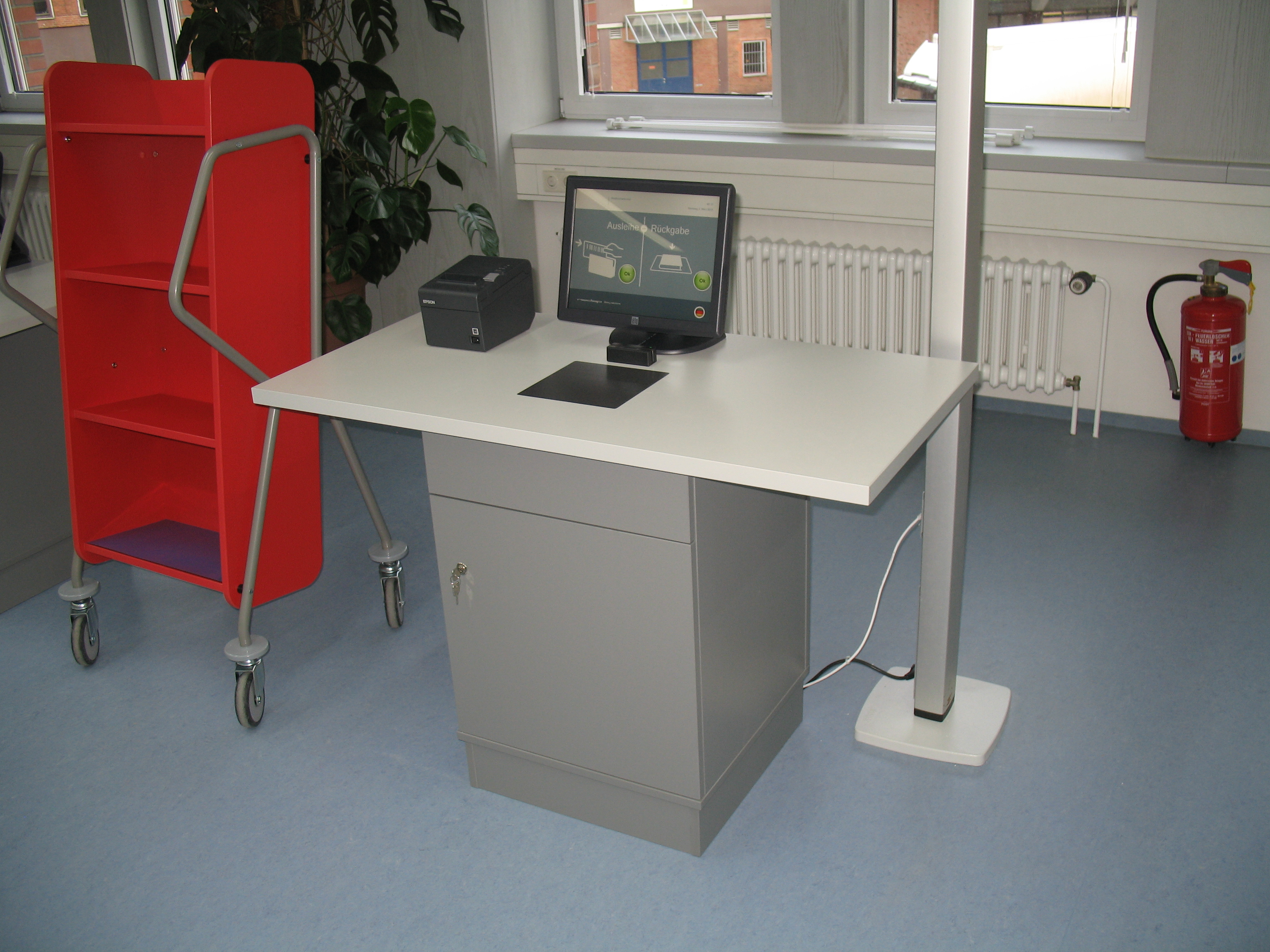 Selbstverbuchungsterminal im Vollbild